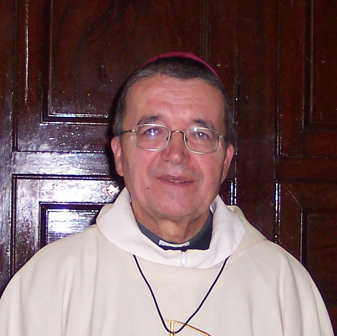 Monsignor Vicent Landel, arcivescovo di Rabat dal 2001